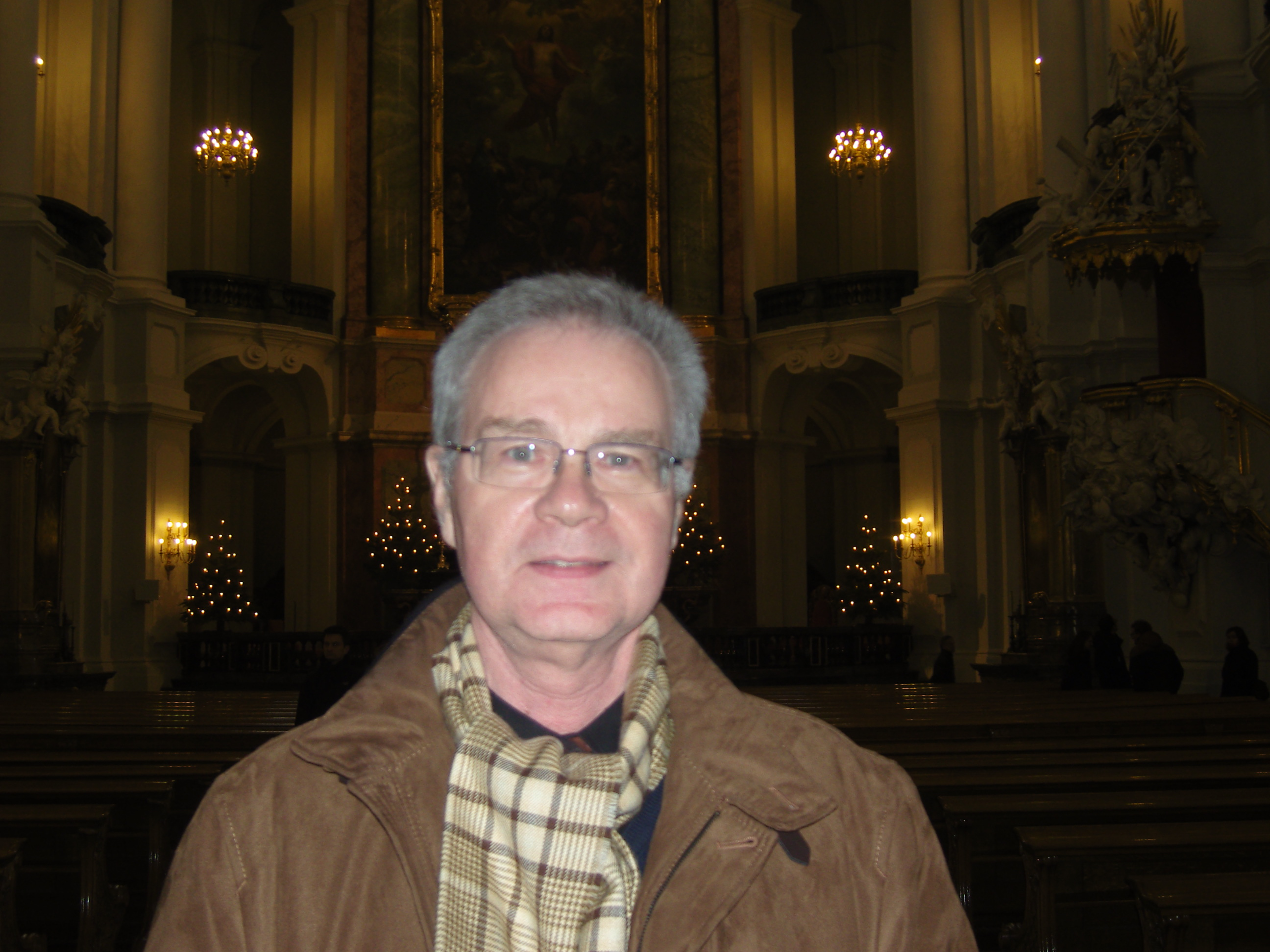 Der Dresdner Autor und Historiker Christoph Pötzsch in der Hofkirche Dresden im Januar 2014